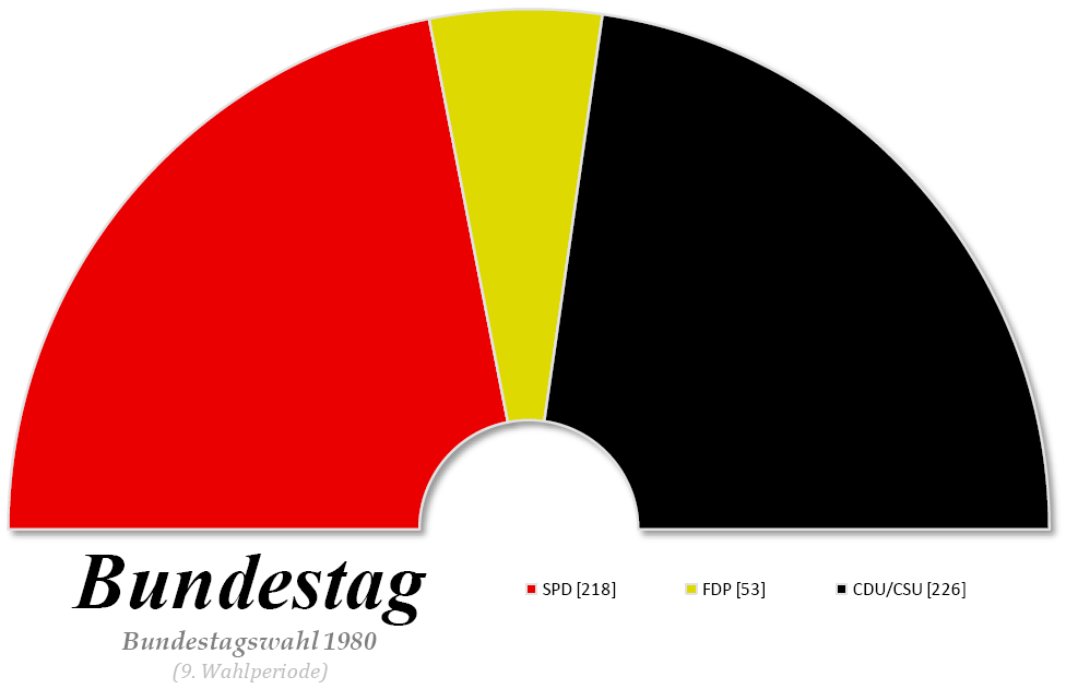 Composition du Bundestag allemand à l'issue des élections fédérales de 1980